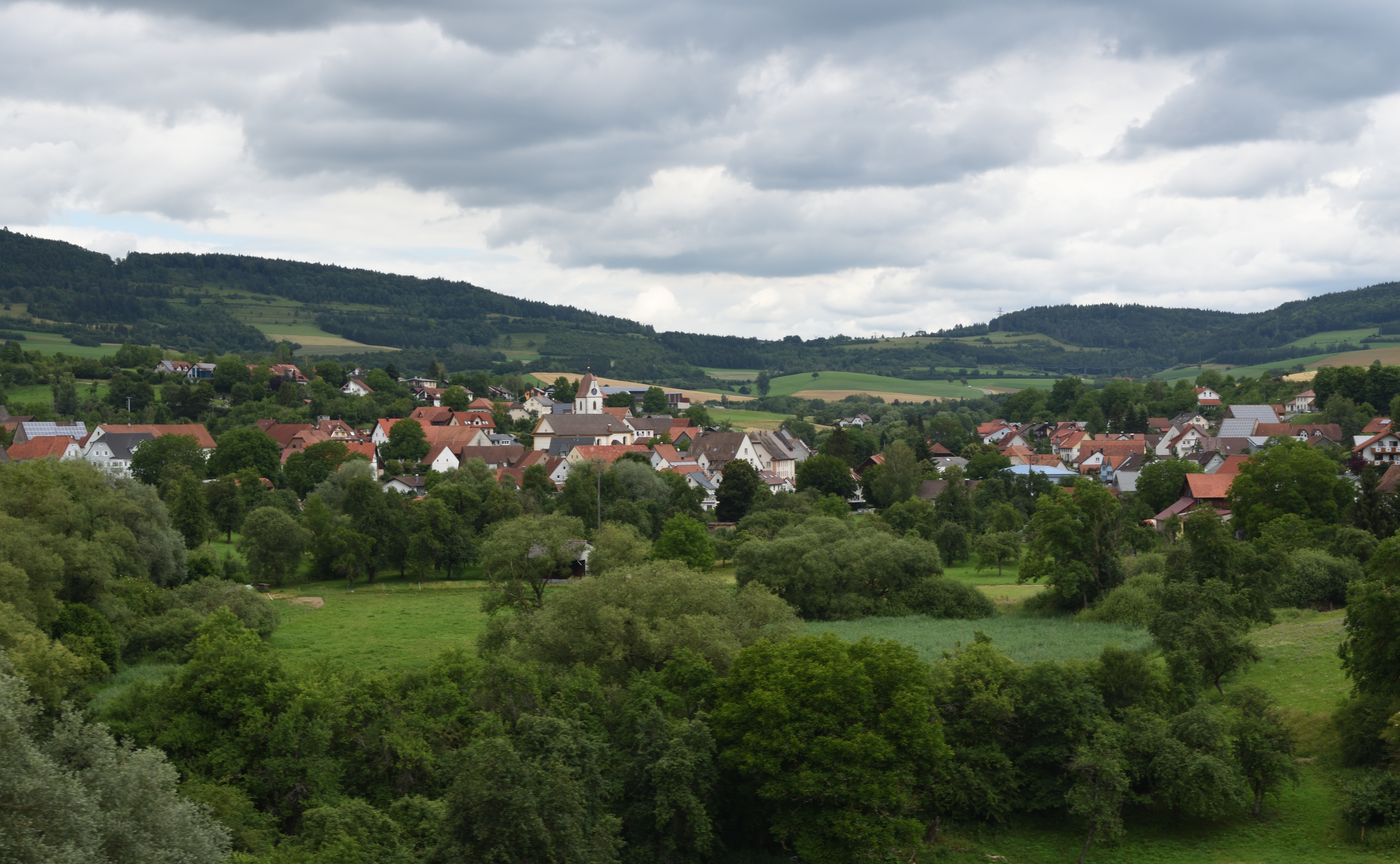 Fützen von der Sauschwänzlesbahn aus gesehen